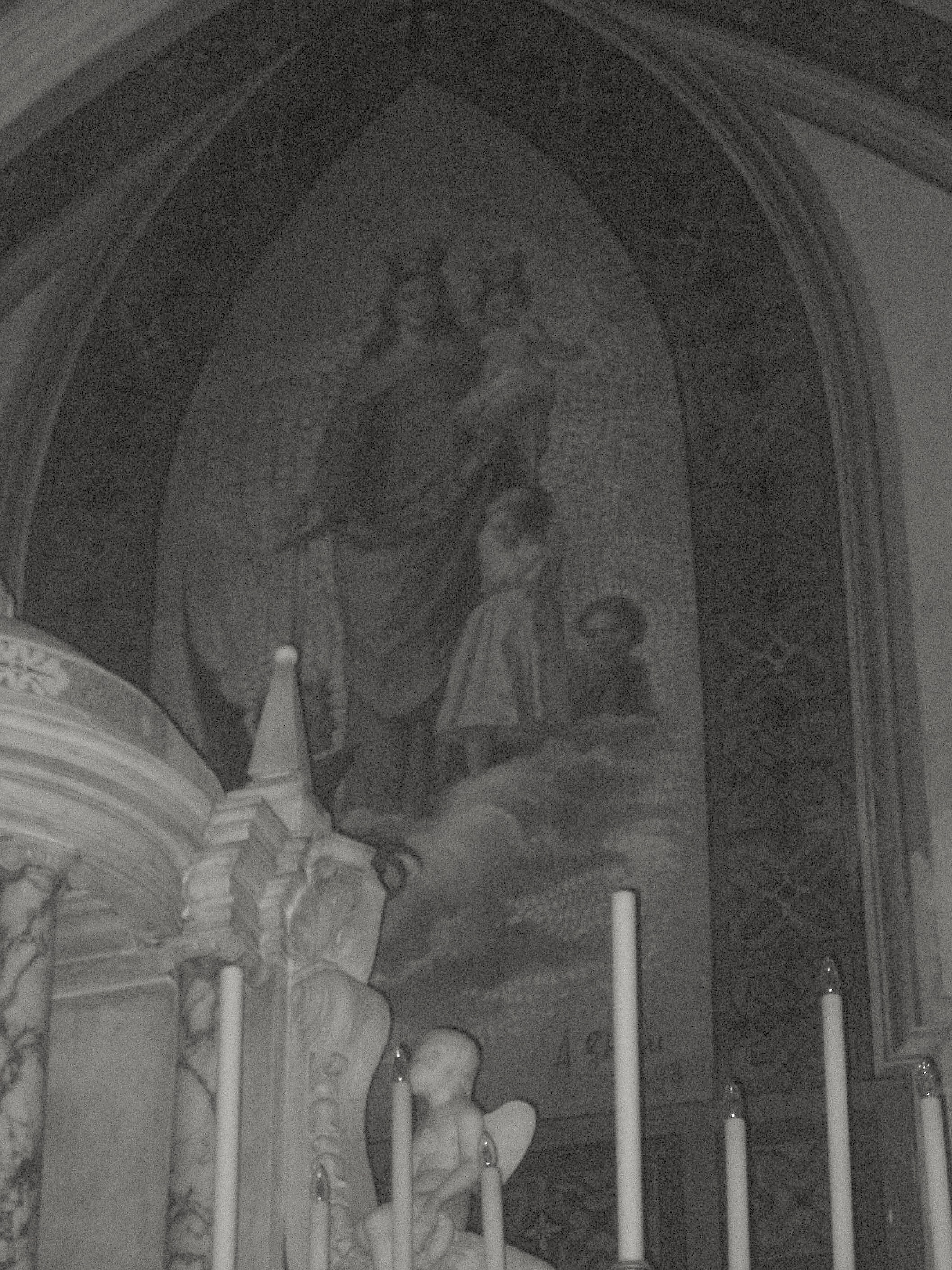 Antonio Ghisu, abside della chiesa di San Giorgio, Quartucciu (CA)